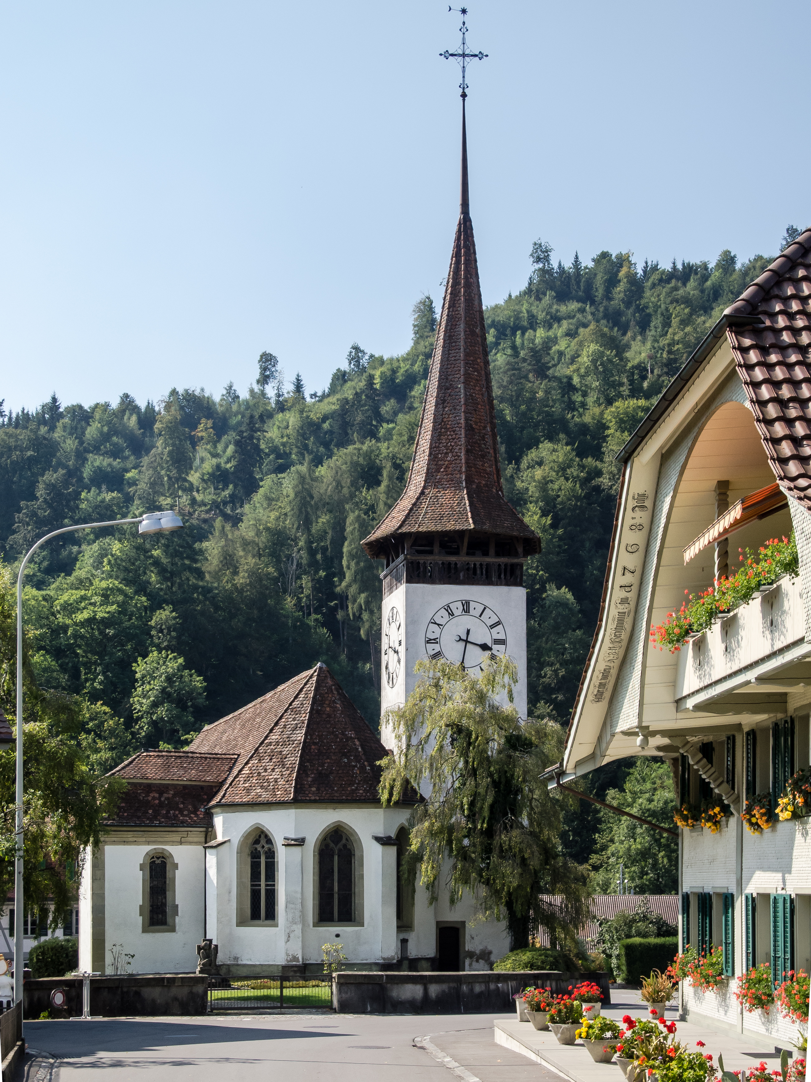 Familienkapelle von Wattenwyl, angebaut an die reformierte Kirche Oberdiessbach (links im Bild)